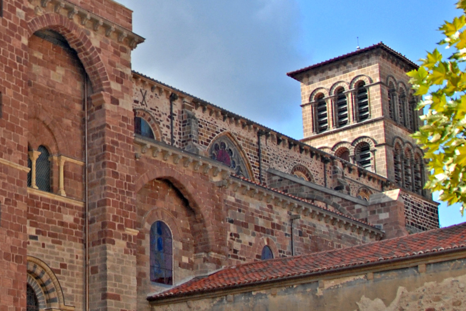 St.-Julien Brioude, Langhaus von N